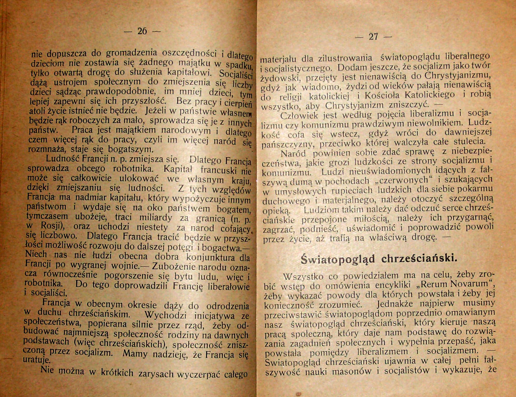 Stanisław Krzyżowski, Rozmyślania w czterdziestą rocznicę encykliki „Rerum novarum”, wydanej 15 maja 1891 r. przez papieża Leona XIII, Pszczyna 1931